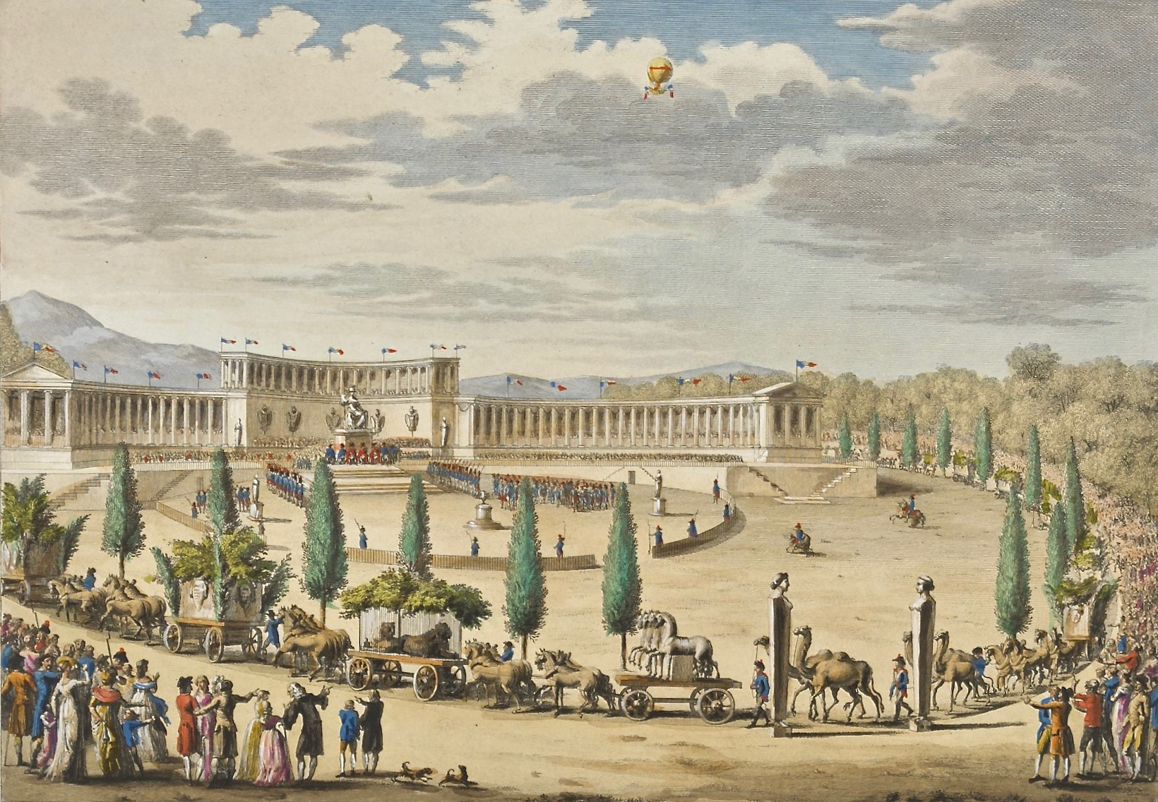 Kolorierte Radierung von Pierre-Gabriel Berthault (1737–1831) nach Girard: "Entrée triomphale des monuments des sciences et arts en France, fête à ce sujet, les 9 et 10 Thermidor, an 6ème de la République.” 23 x 31 cm. Erklärung: "Fête de la Liberté" in Paris, 27./28. Juli 1798, zur Erinnerung an die Beendigung der Schreckensherrschaft Maximilien de Robespierres im Jahre 1794. Triumphzug mit Pflanzen der Expedition von Nicolas Baudin in die Antillen (1796–1798), den von Napoleon Bonaparte erbeuteten Pferden von San Marco, exotischen Tieren etc.